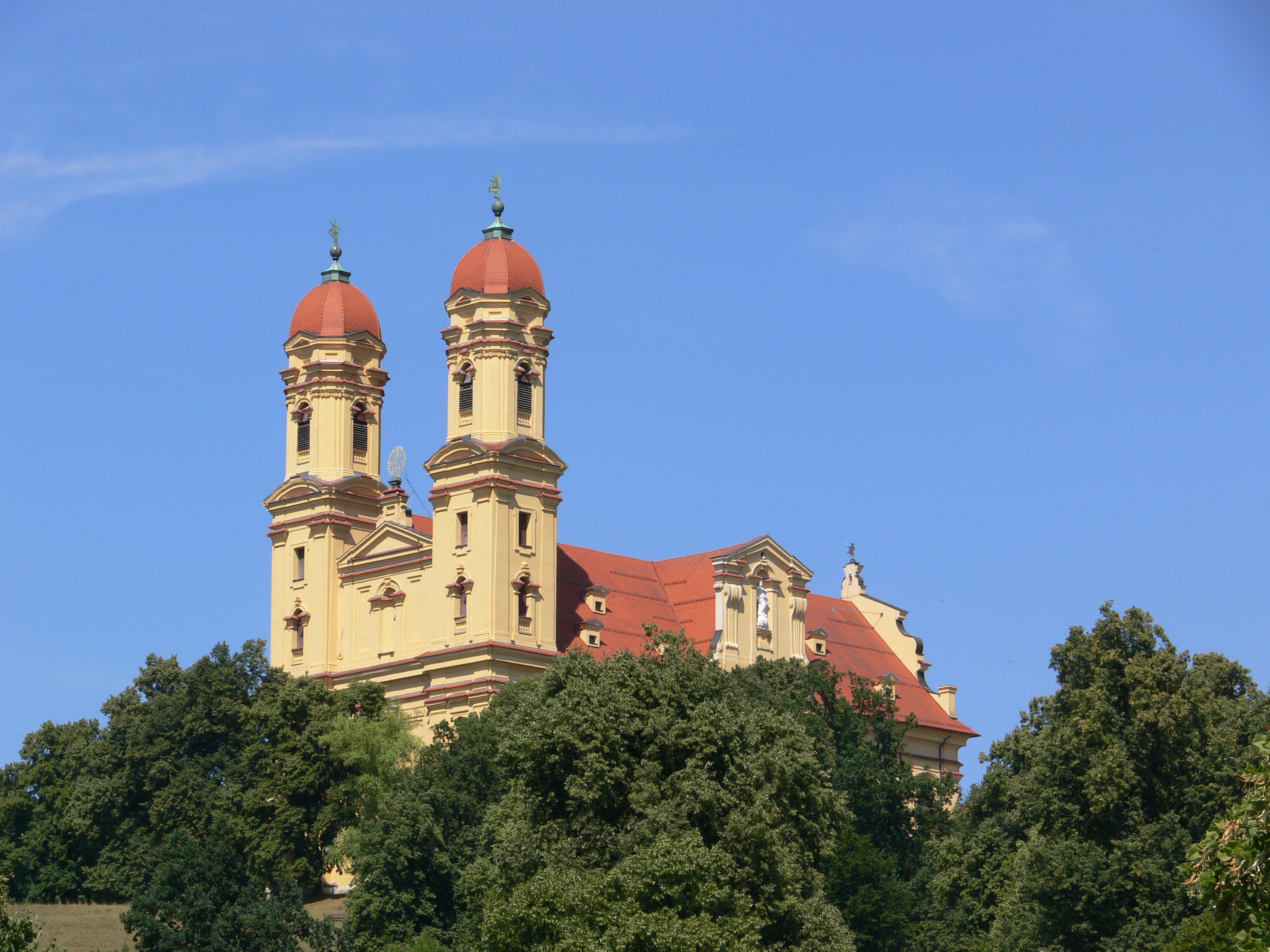 Schönenberg, Ellwangen (Jagst) Wallfahrtskirche Unsere Liebe Frau auf dem Schönenberg